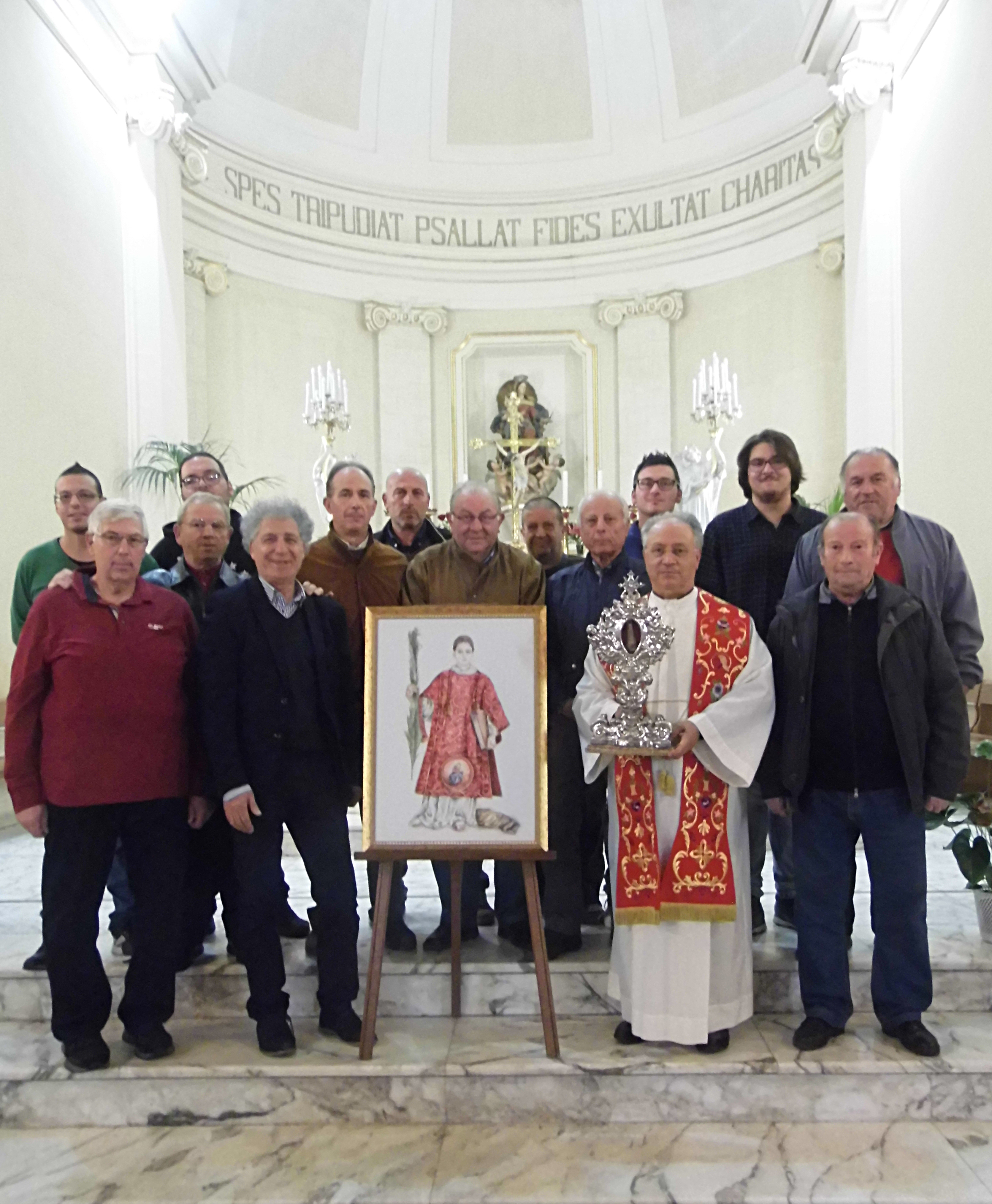 Mons. Gino Scardino ed il Comitato Feste Patronali accanto al reliquiario ad ostensorio in argento di San Cesario diacono e martire, Parrocchia Santa Maria delle Grazie in San Cesario di Lecce.